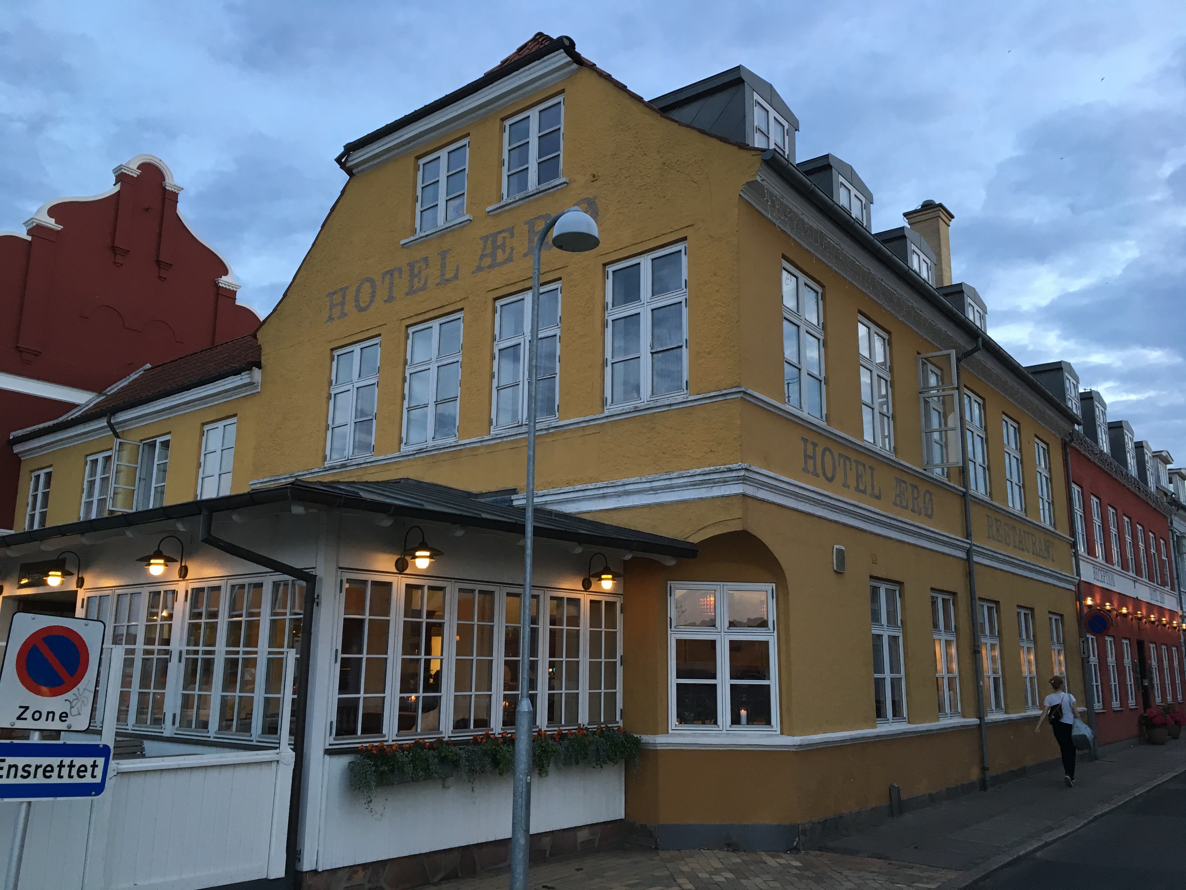 Hotel Ærø ud til havnen i Svendborg